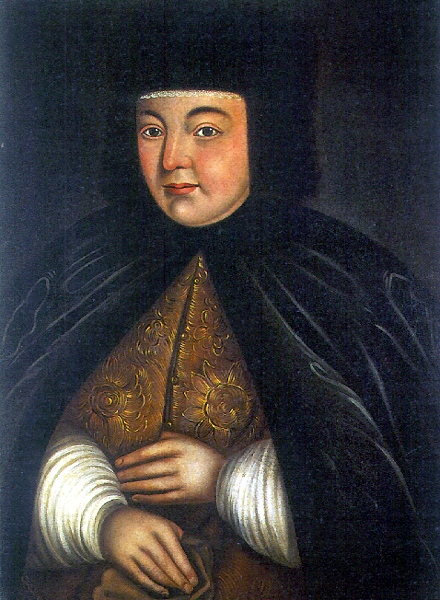 Tsarina Natalia Narishkina, mother of Peter the Great Нарышкина Наталья Кирилловна Ярославский художественный музей